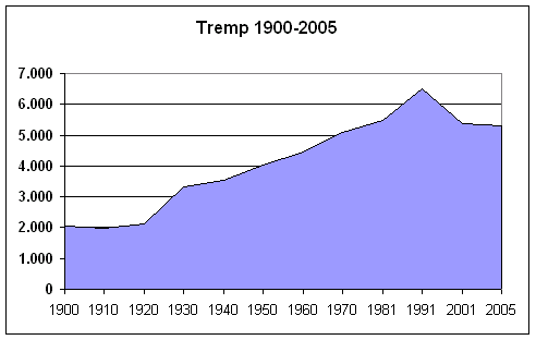 Tremp's population, Lleida (Lérida, Lerida), Spain, (1900-2005). Own work, given to PD. Source: Instituto Nacional de Estadística.